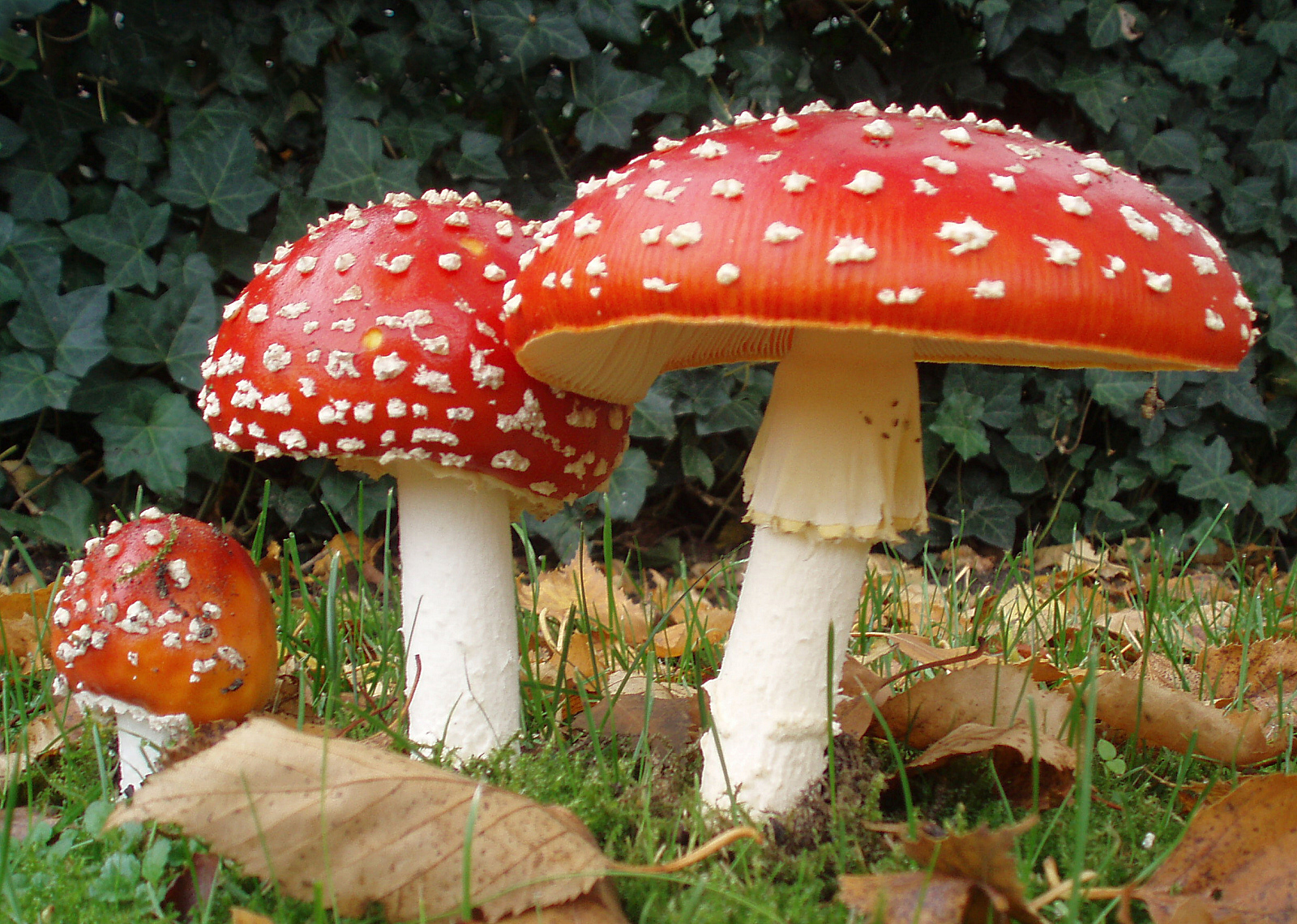 Drie vliegenzwammen op rij in de wijk Dieze-Oost in Zwolle.